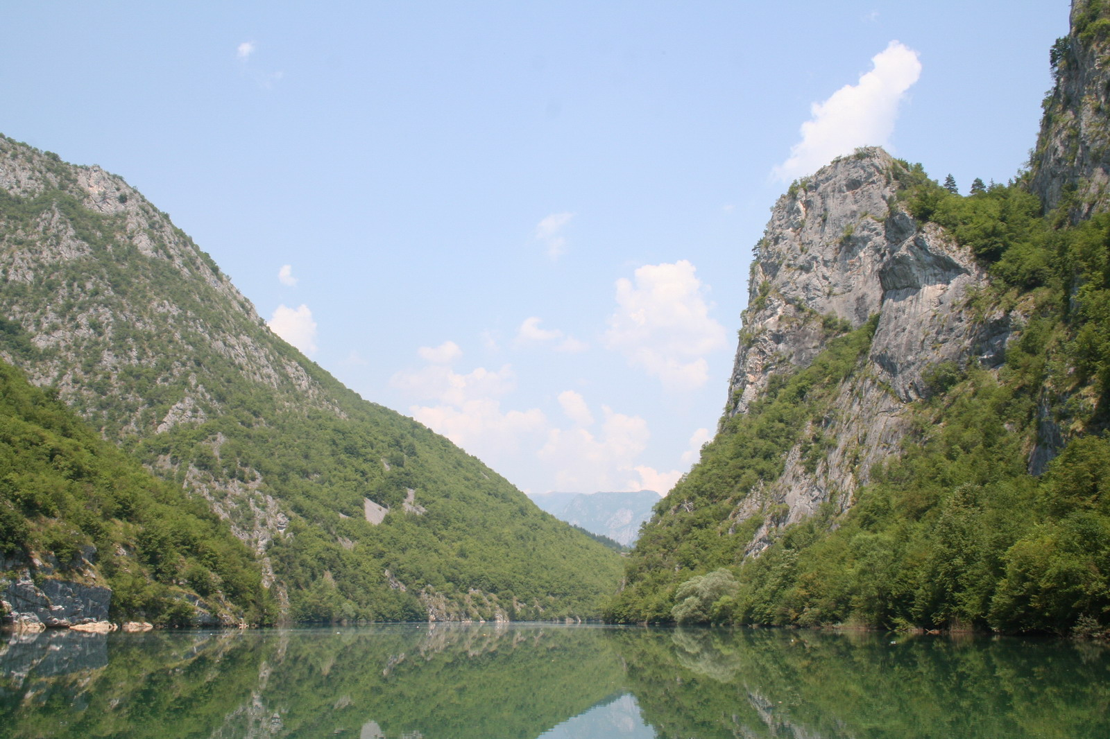 Drina river